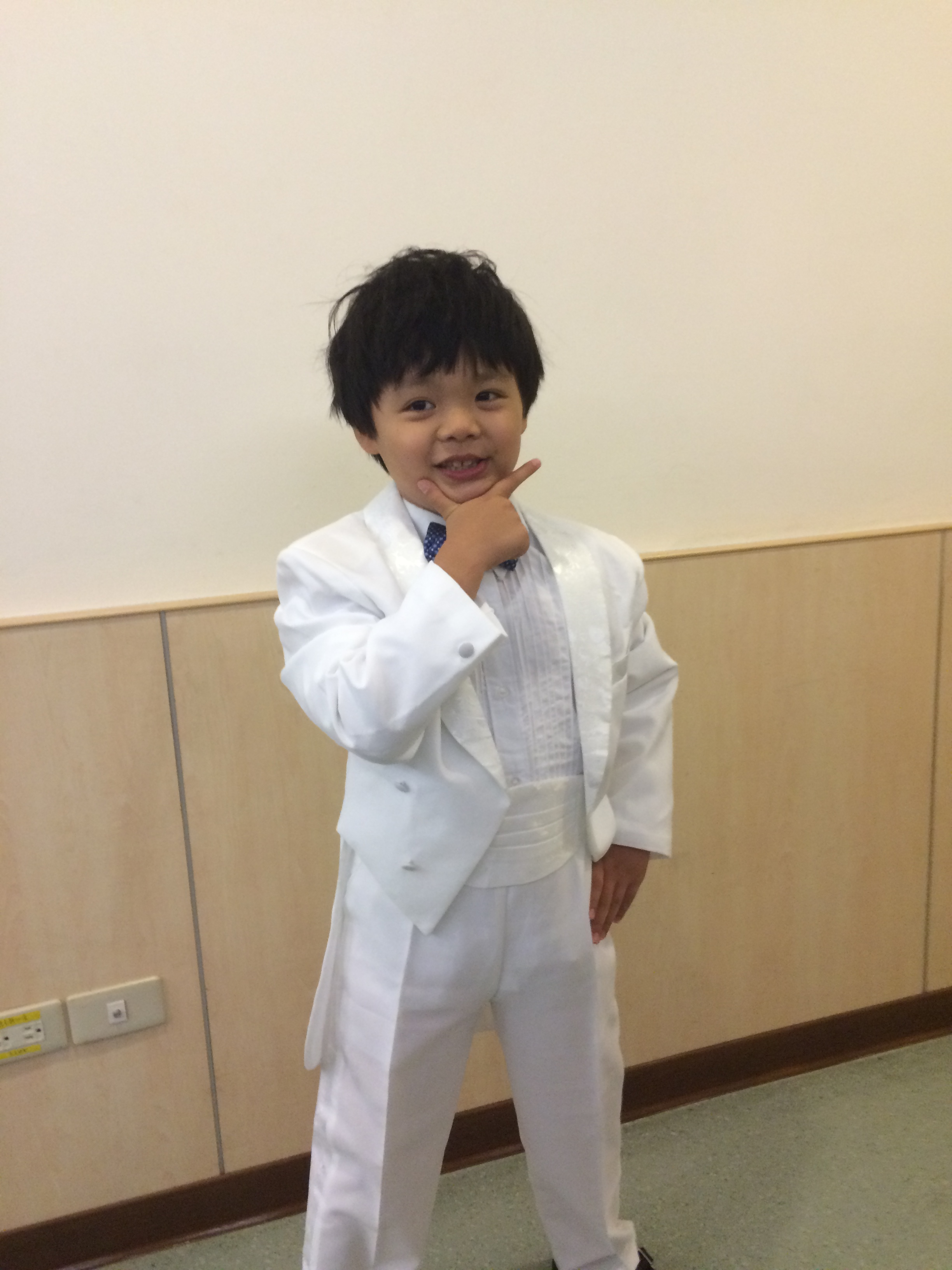 台灣兒童歌手 2008年10月出生於台灣桃園市。 《超級紅人榜》第一屆親子擂台賽冠軍，熱衷參與各項公益活動。